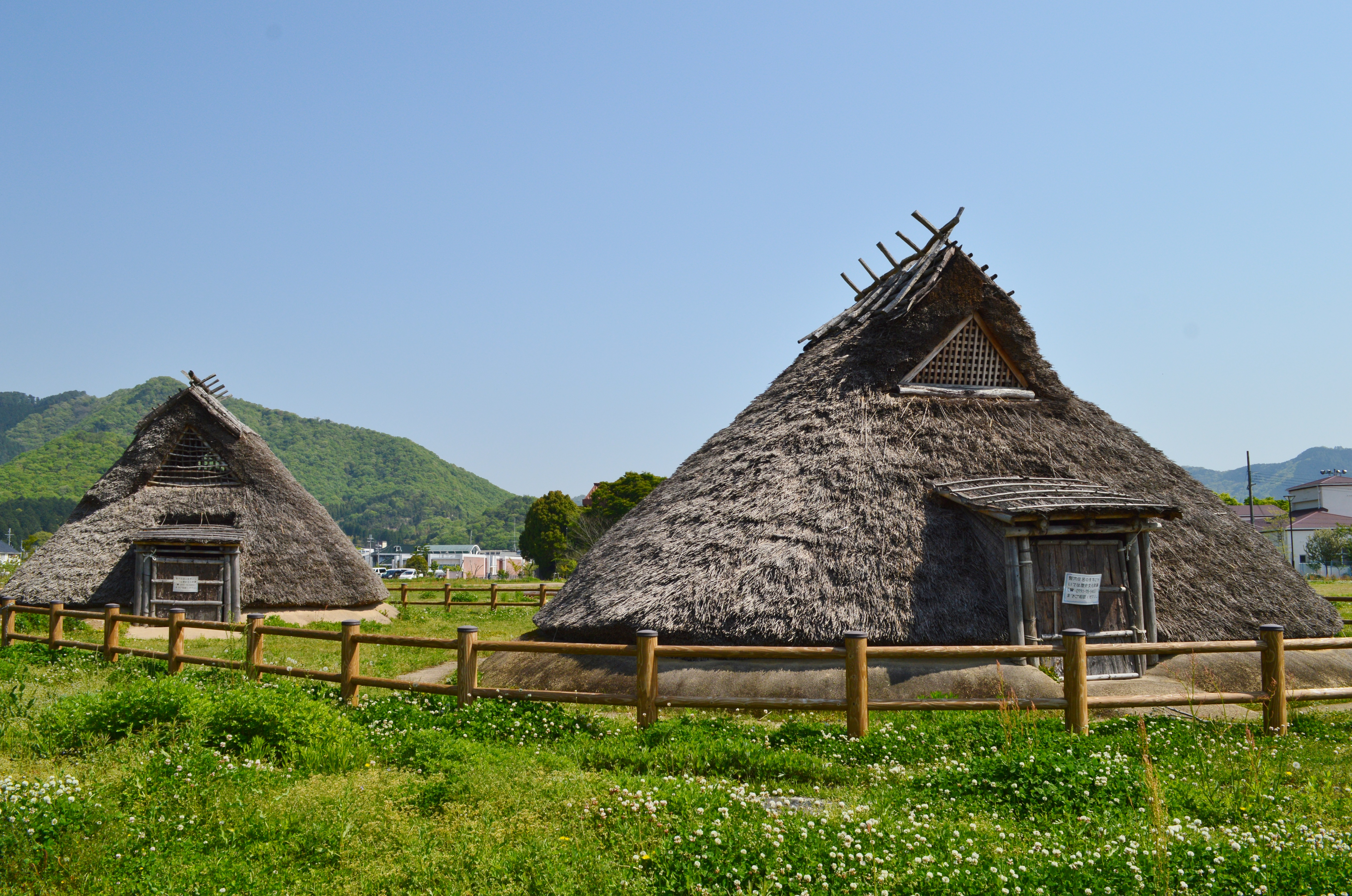 新宮宮内遺跡 竪穴式住居